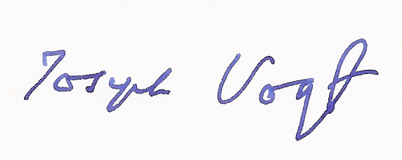 Joseph Vogt. Signatur 1979 seines Grußes an mich